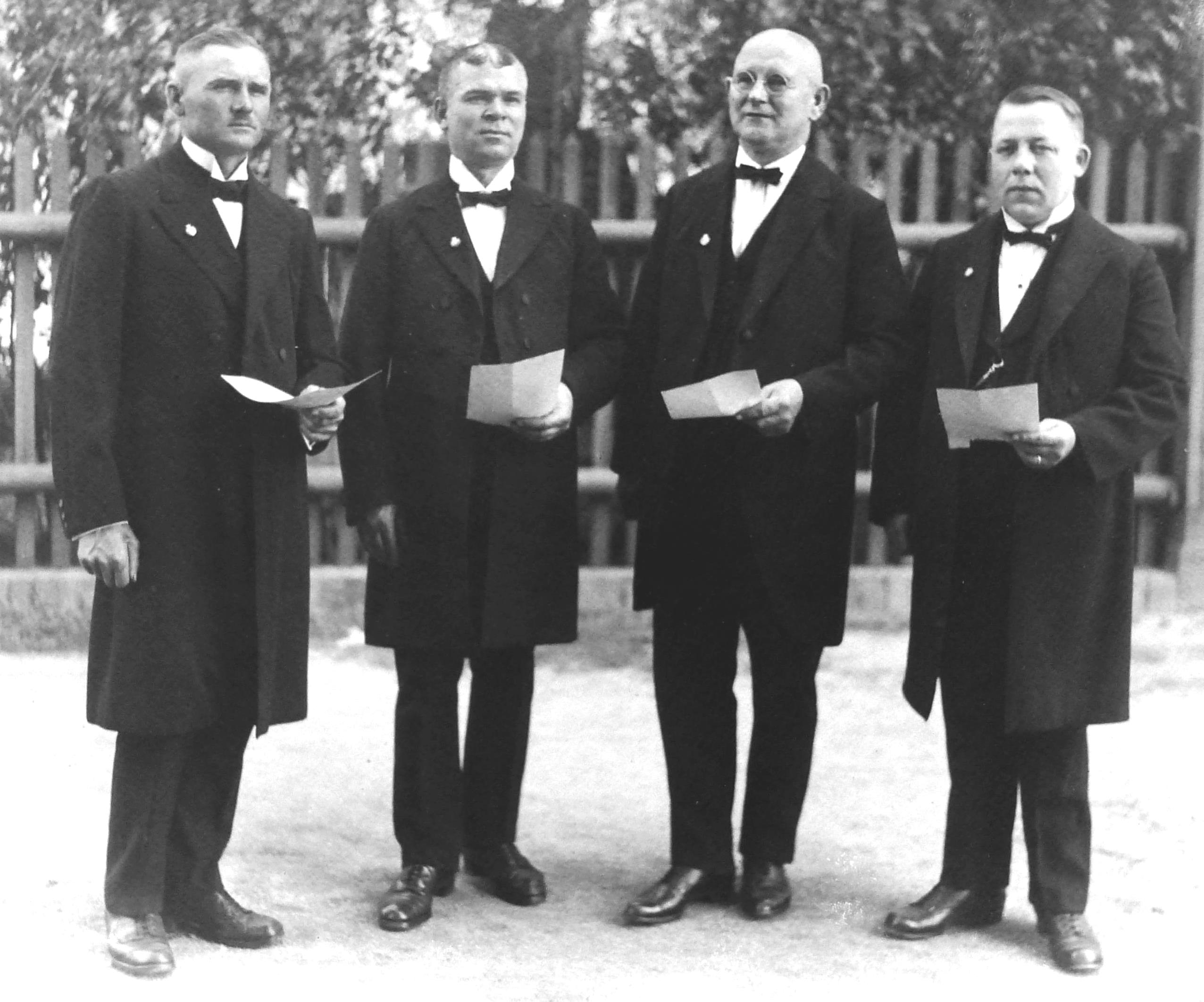 Quartett des Männergesangsvereins der Sächsischen Glasfabrik Radeberg 1928